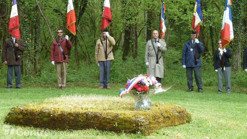 commémoration Puits de Guerry